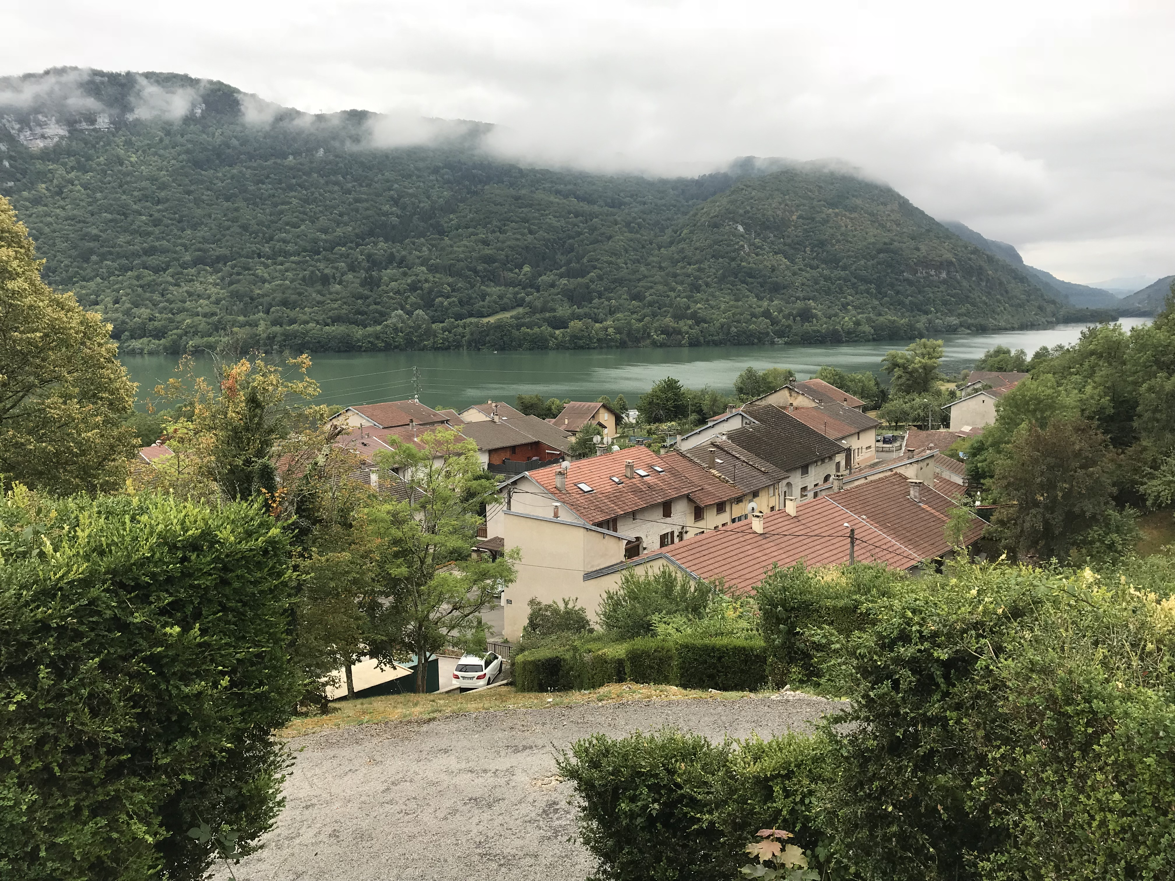 Condes (Jura, France) en juillet 2018.